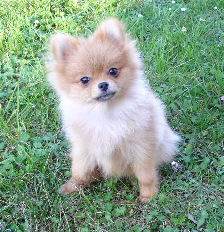 Pomeranec.